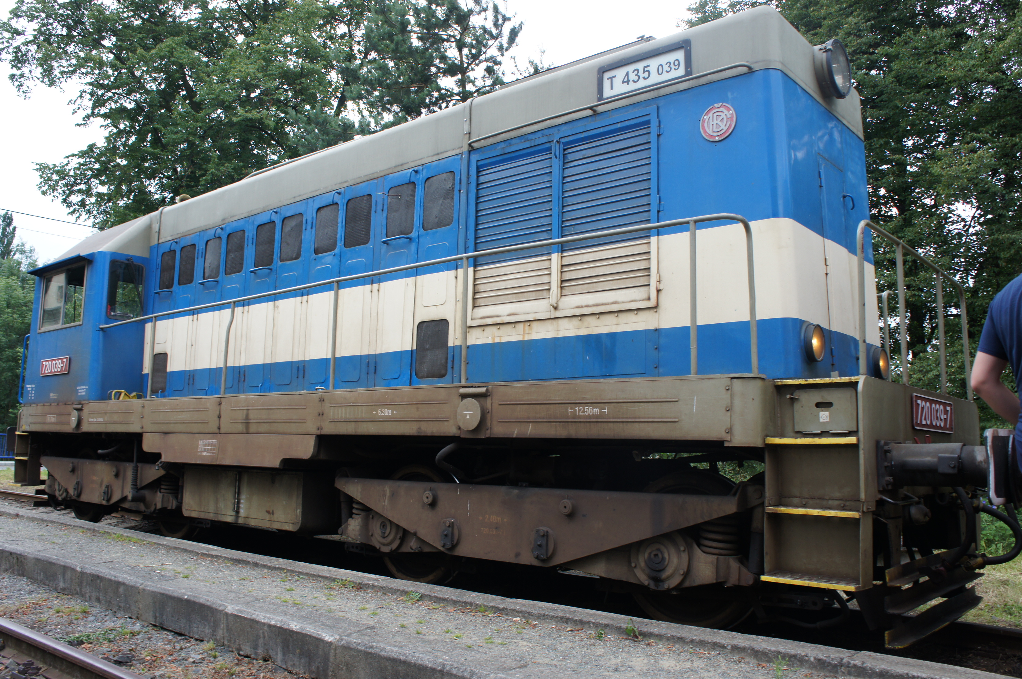 modrý Hektor 720.039-7, který se na Hvozdnickém Expresu objevil v roce 2014.